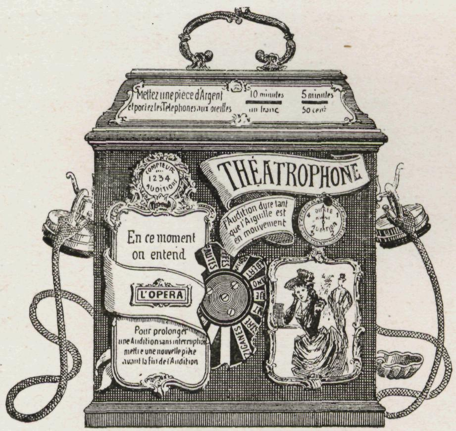 Münzbetriebenes Empfangsgerät des Theatrophons